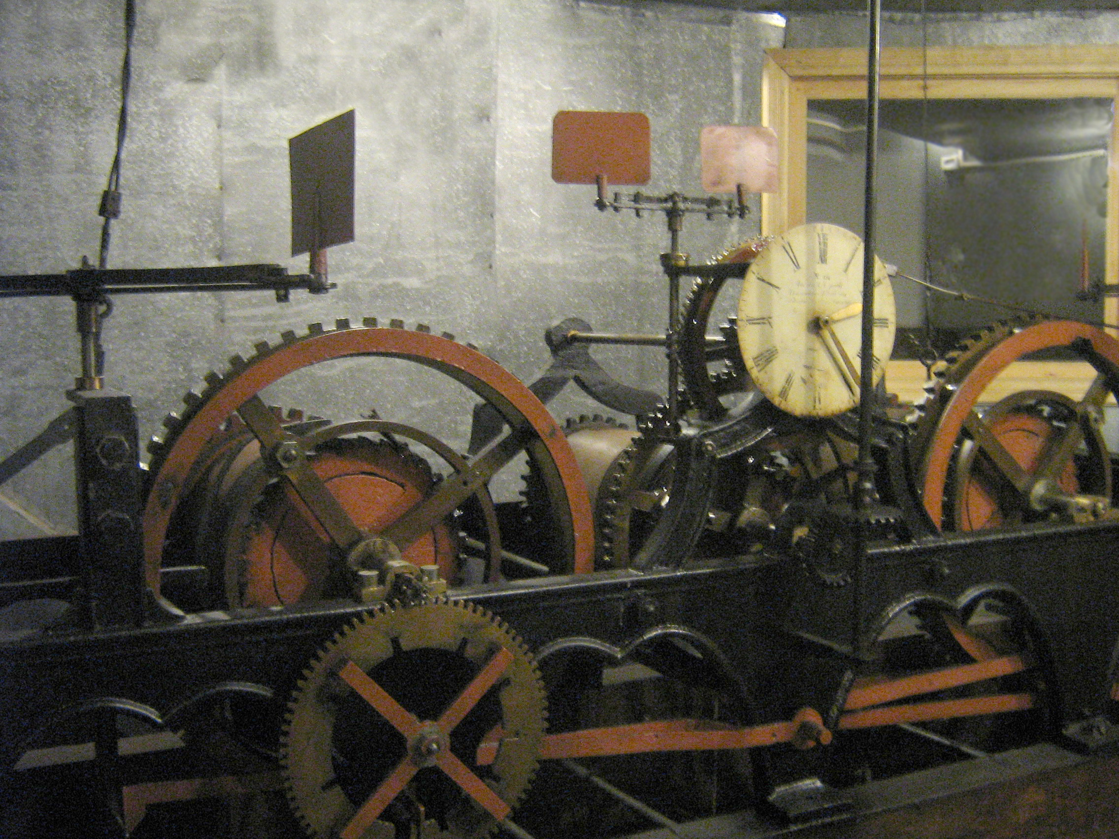 Механізм годинника львівсьої ратуші